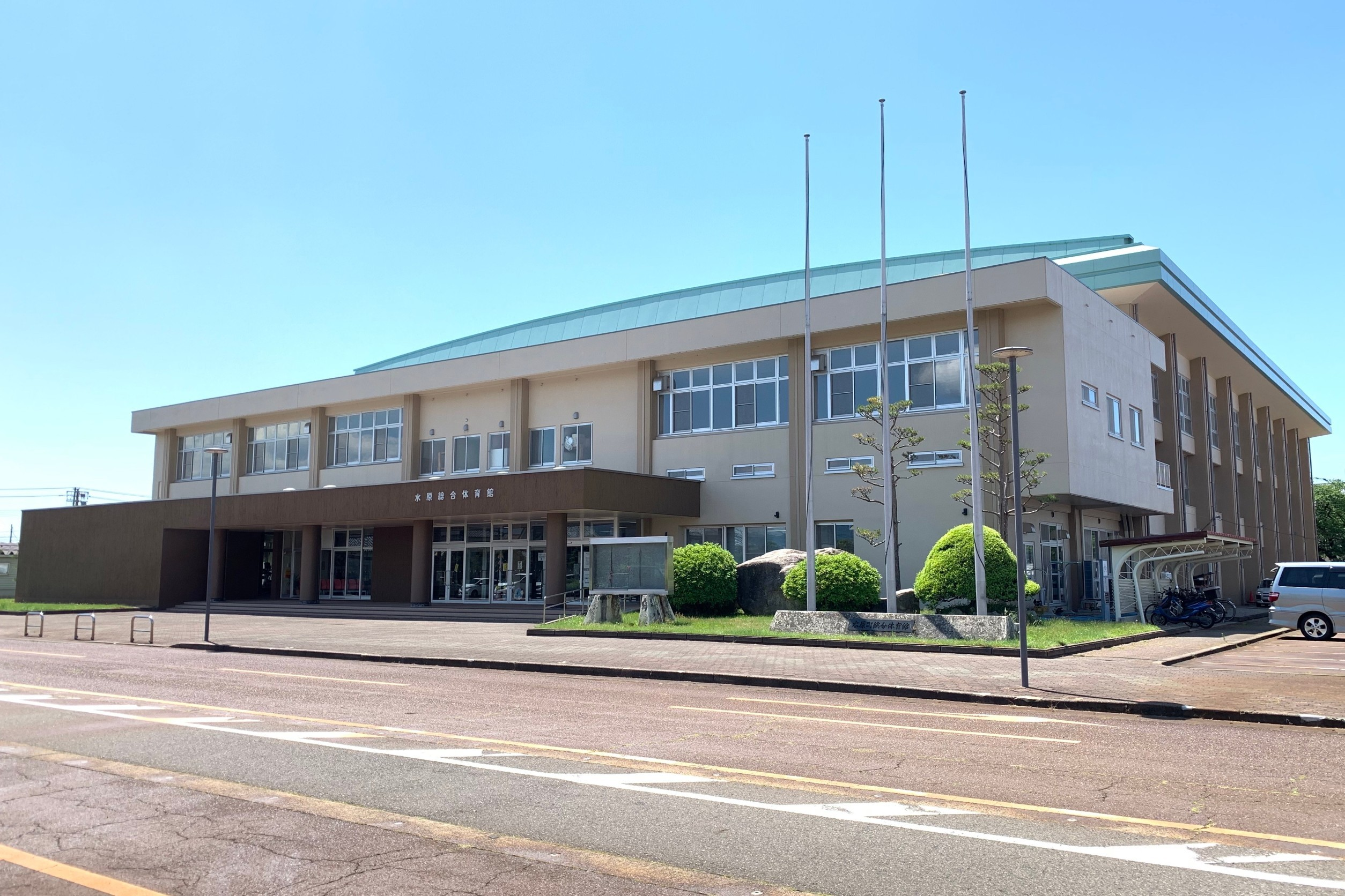 水原総合体育館（阿賀野市，2020年5月）